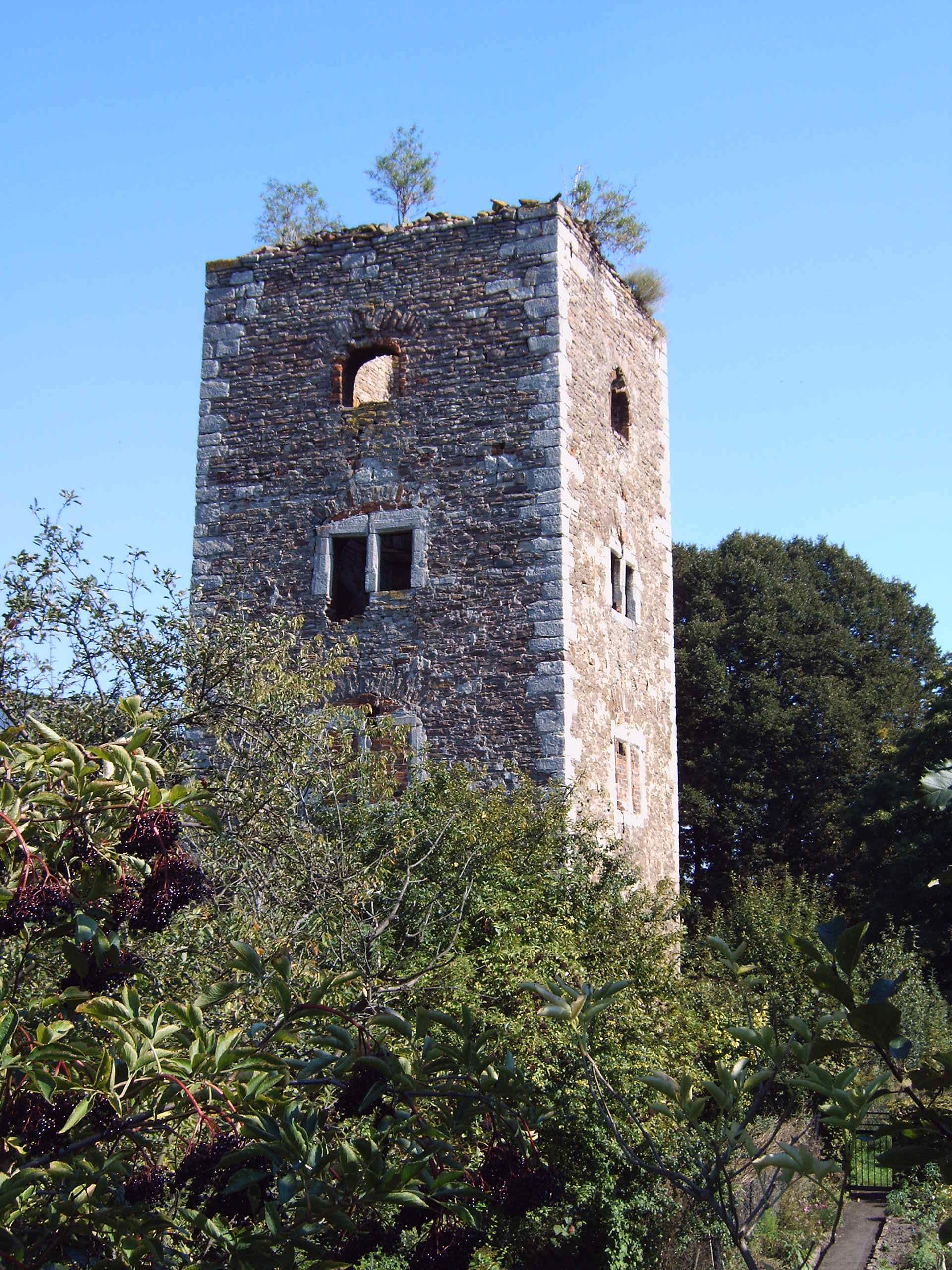 Wohnturm in Benneckenbeck, Westseite, Bild aufgenommen von Benutzer:Olaf2 am 20. September 2005